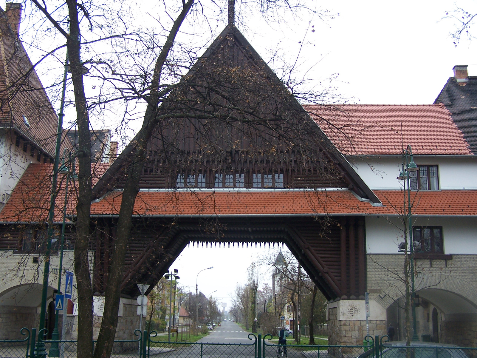 Lakóház (Budapest 19, Kós Károly tér 10.) This is a photo of a monument in Hungary, Identifier: 1264